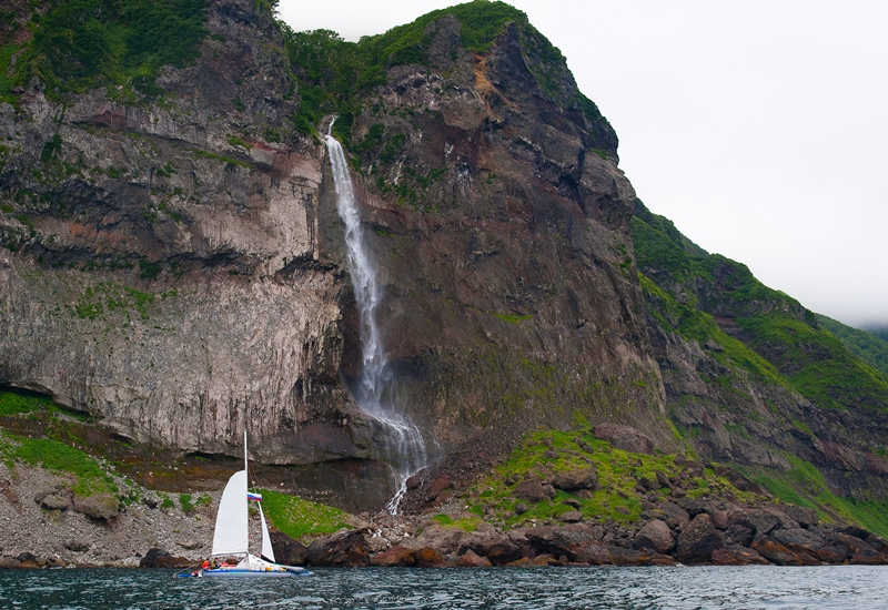 Водопад Илья Муромец